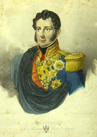 ritratto di Carlo Filangieri (stampa a colori).